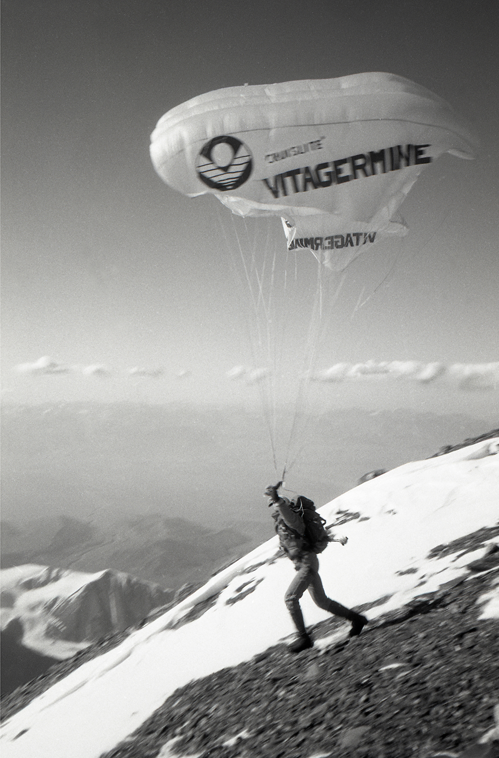 Lenini nõlvalt lendasid paraplaaniga 7000 meetri kõrguselt kaks prantslast 86 III